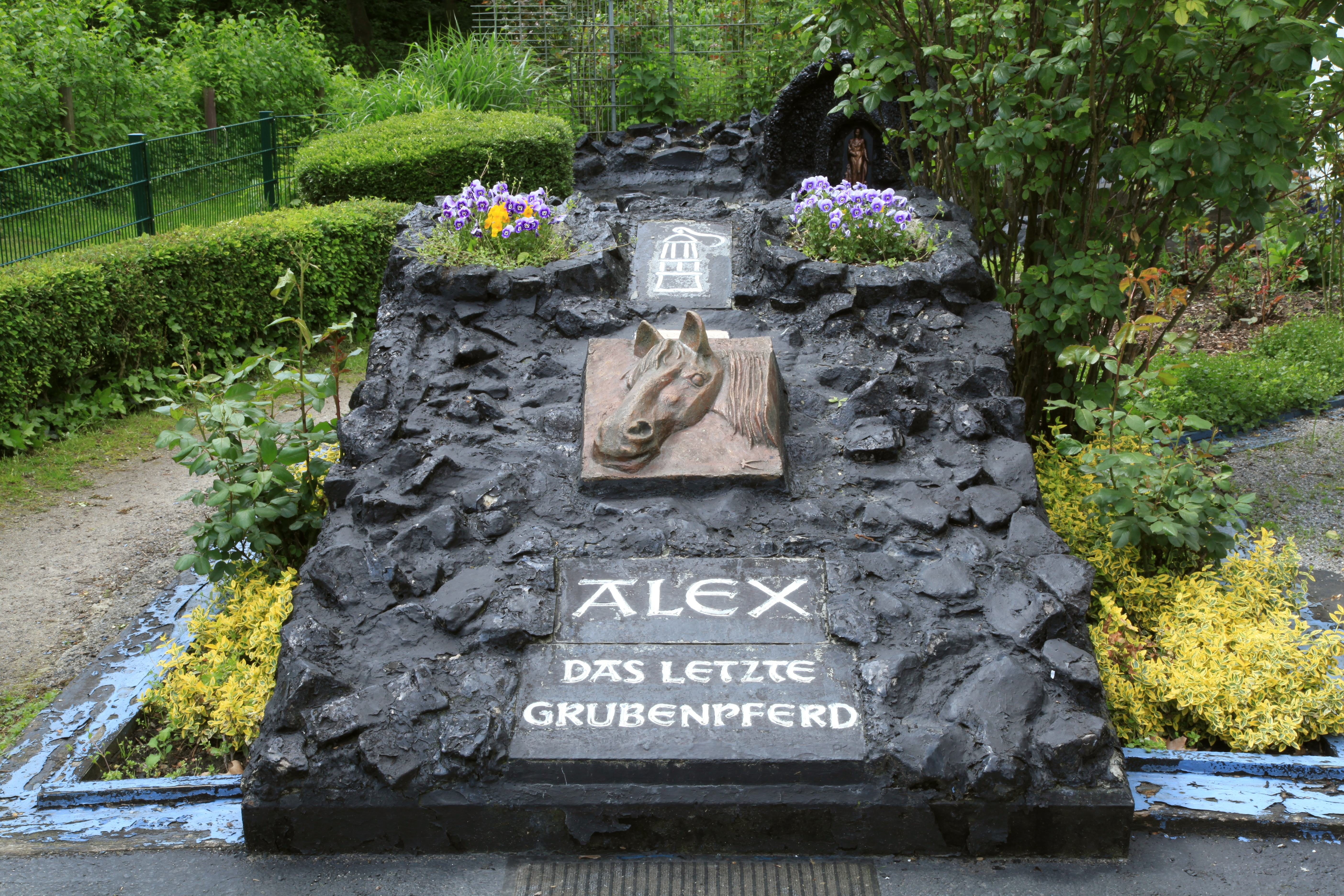 Schrankenwärterhaus der Hugo-Bahn an der Horster Straße in Gelsenkirchen. Gedenkstätte für das letzte Grubenpferd der Zeche Hugo